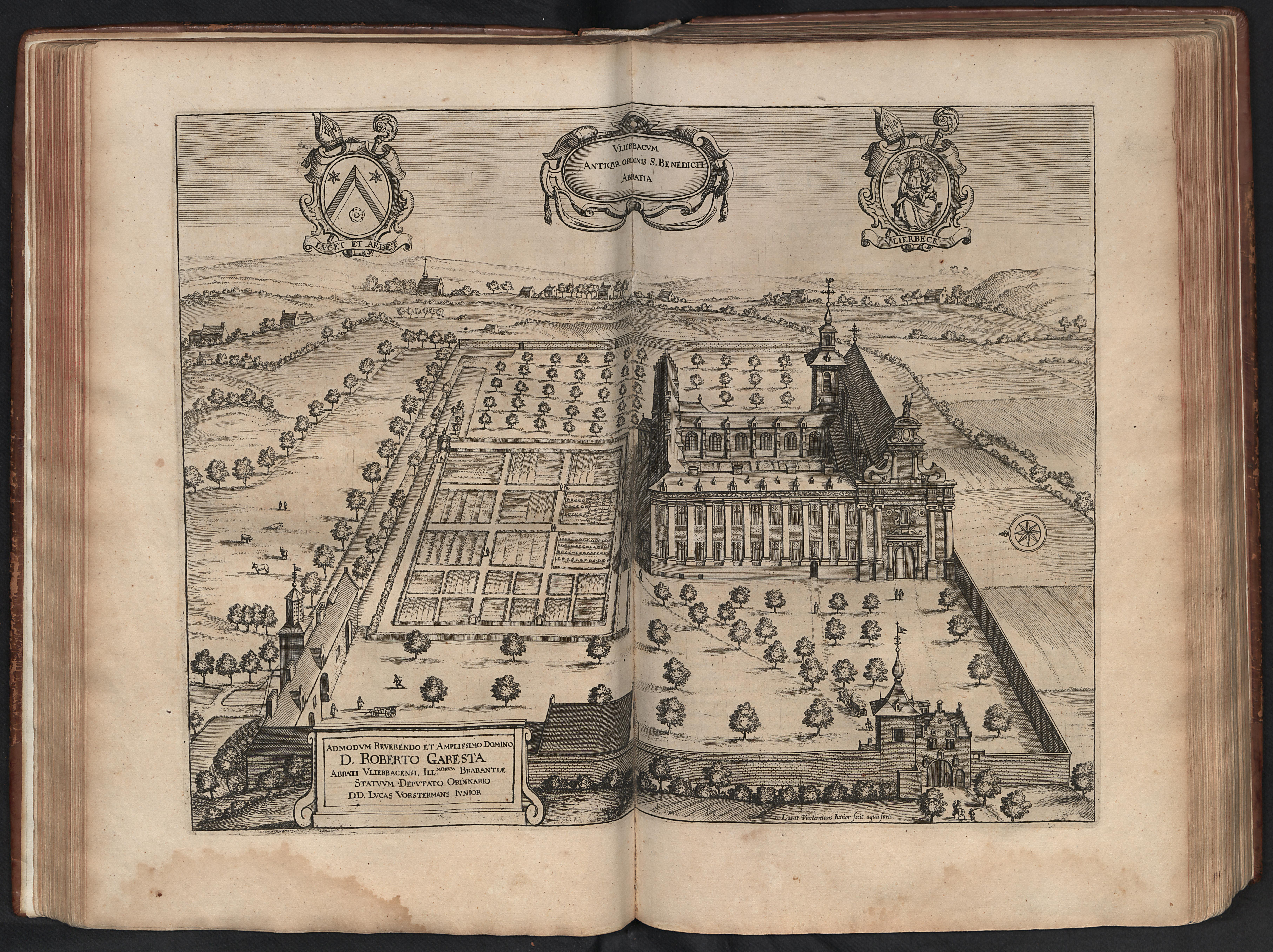 De abdij van Vlierbeek in de 17e eeuw (afbeelding uit Chorographia Sacra Brabantiae van Antonius Sanderus - 1659)